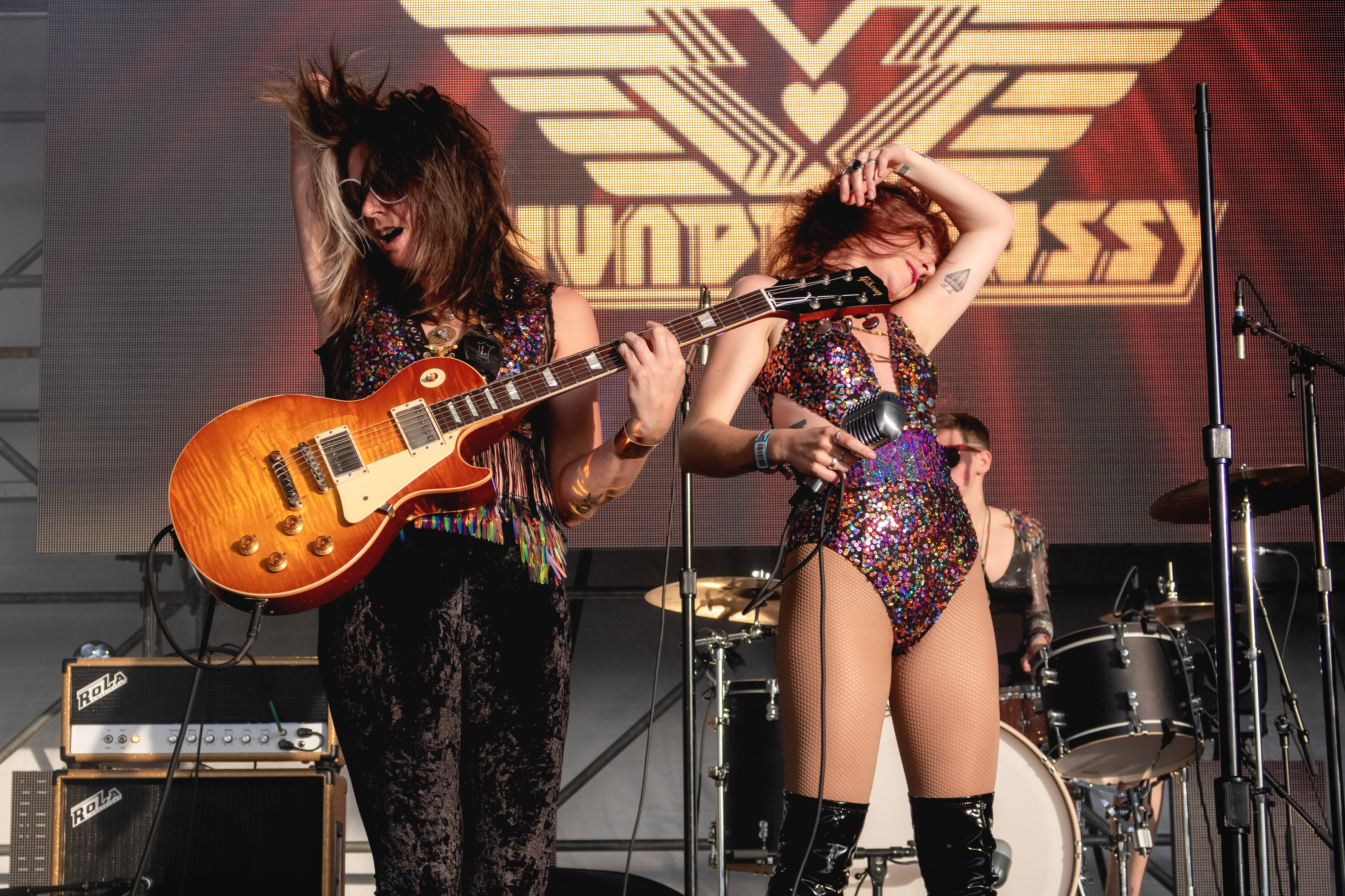 Thunderpussy